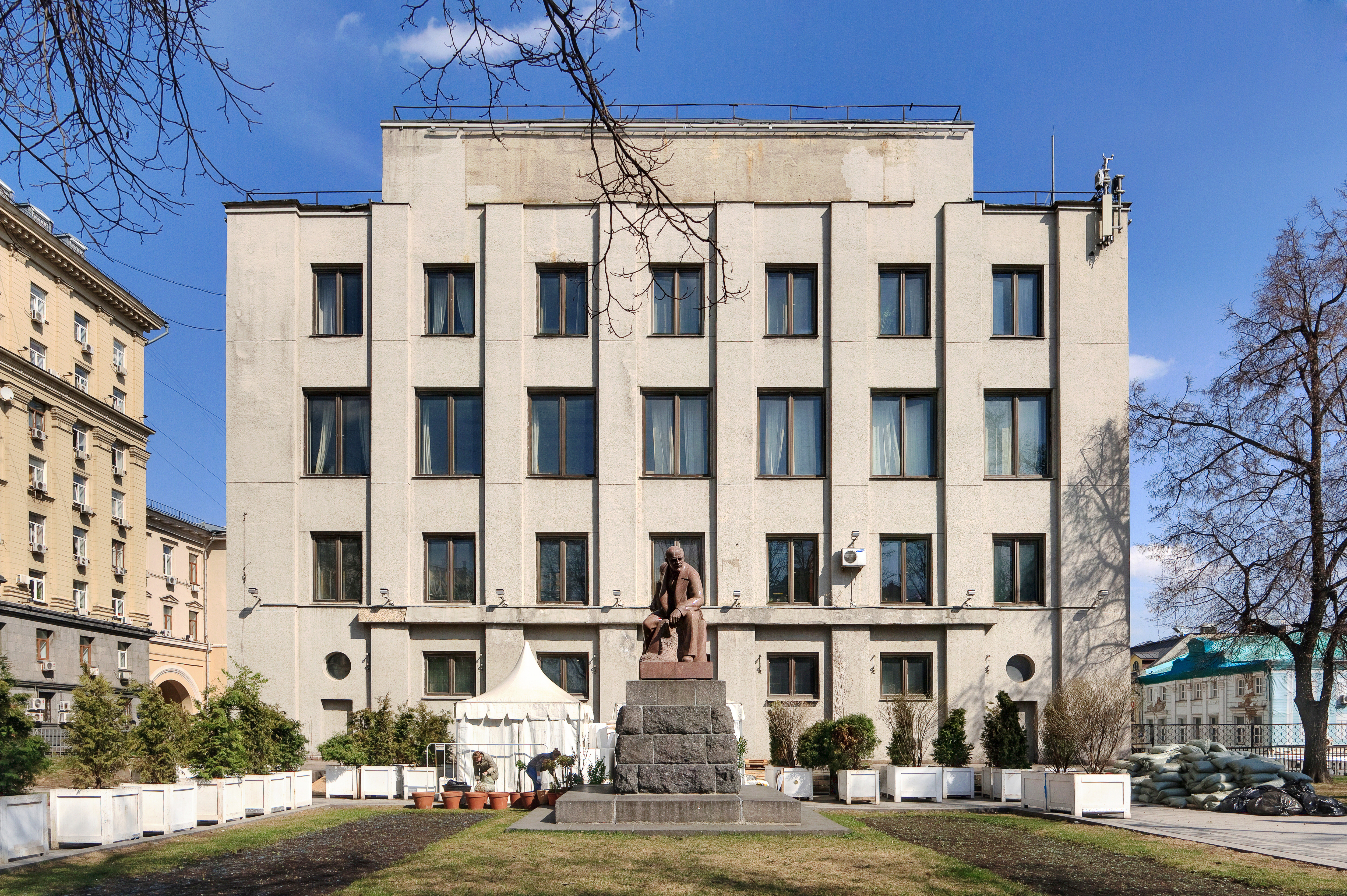 Институт Ленина, сейчас Российский государственный архив социально-политической истории: Дмитровка Б. ул., дом 15, Тверской, Центральный округ, Москва